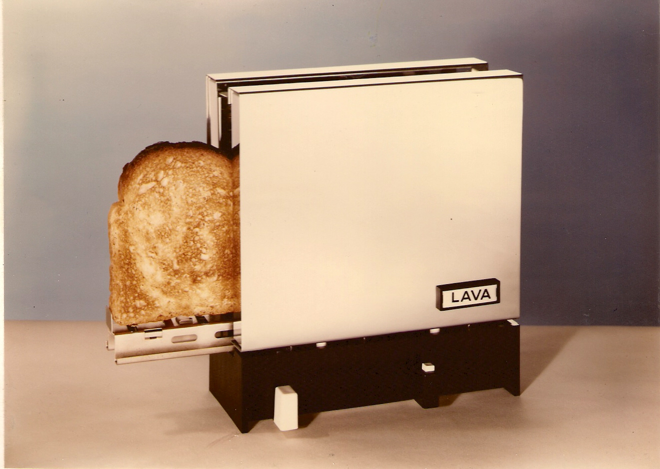 Eberhard Paßler Produkt 1